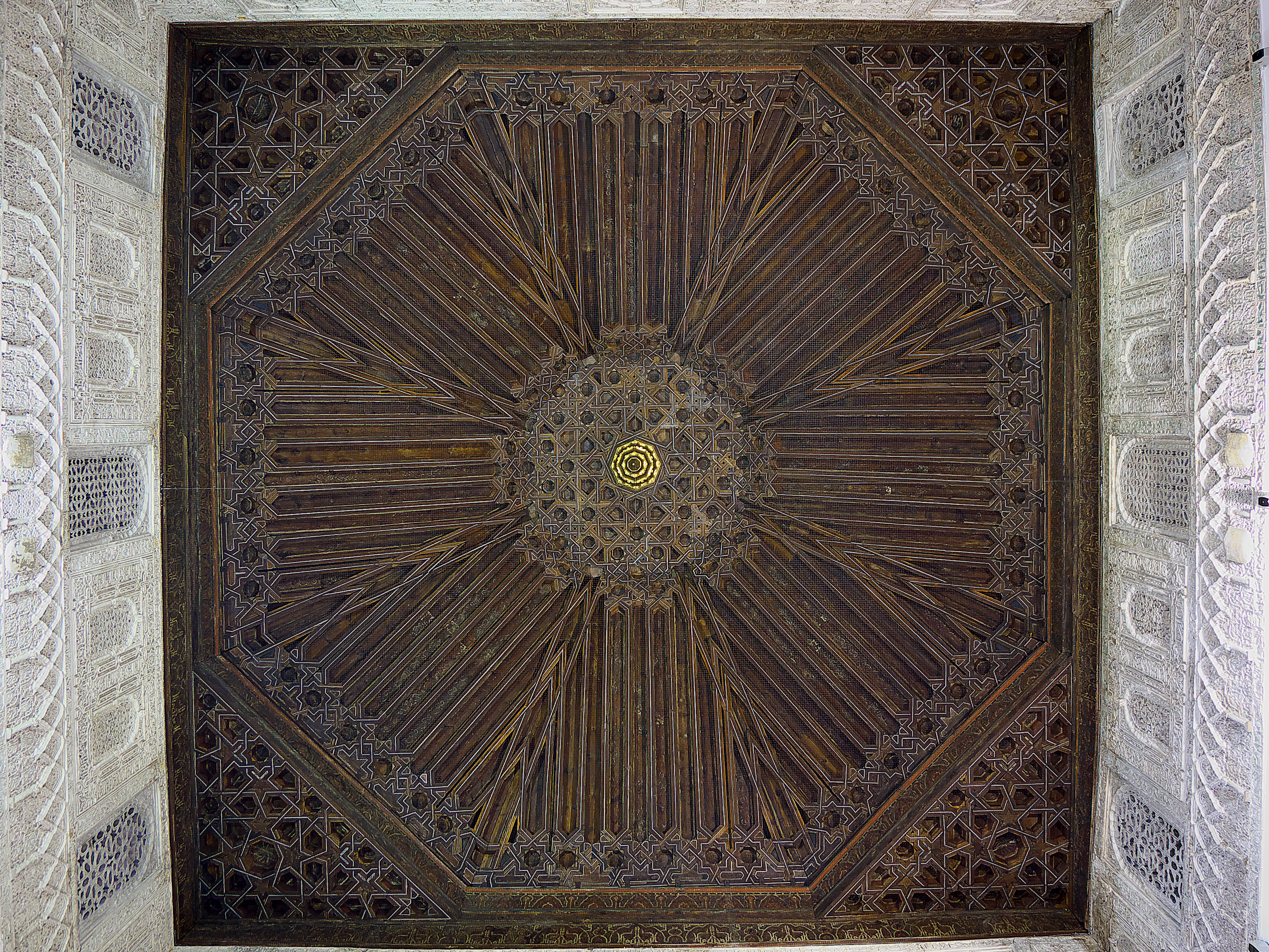 Armadura ochavada de la sala mudéjar mandada a construir por Alfonso XI de Castilla. Primera estructura mudéjar en Sevilla.